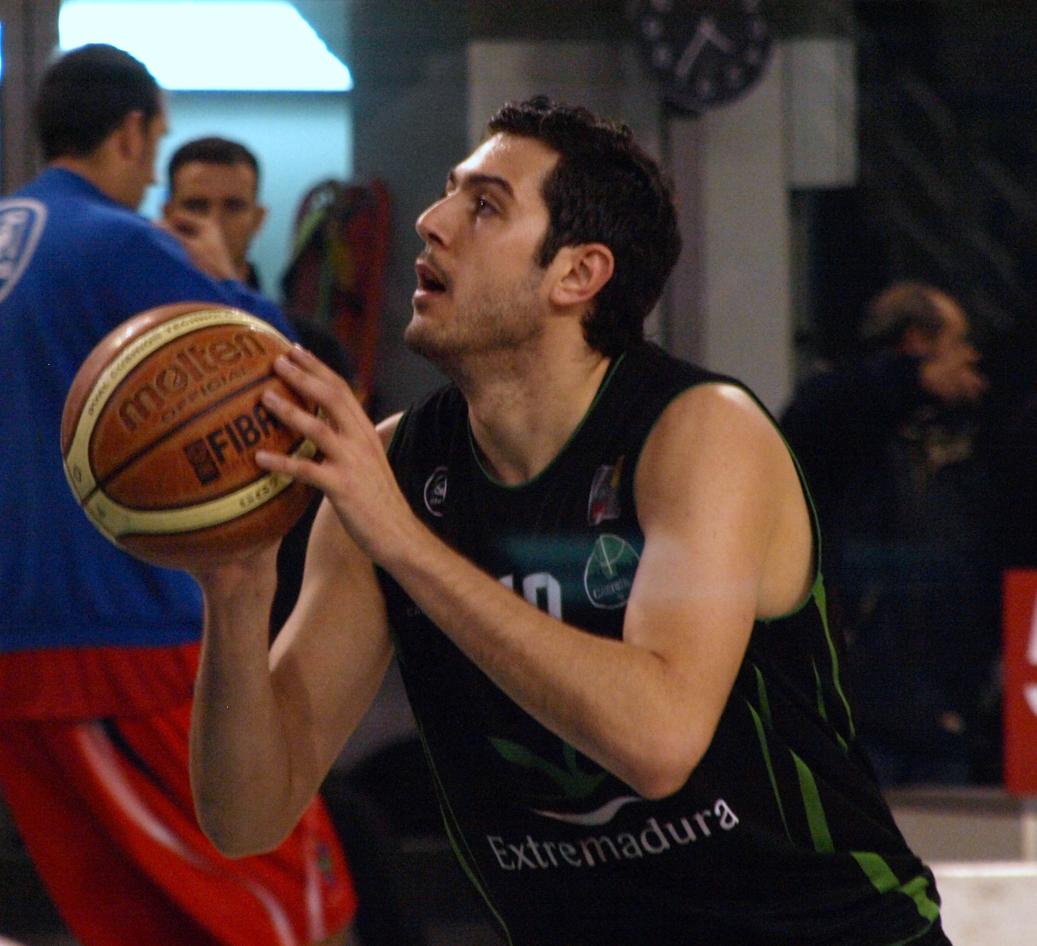 Georgios Dedas con el Cáceres 2016 en un partido de LEB Oro de la temporada 2009/10